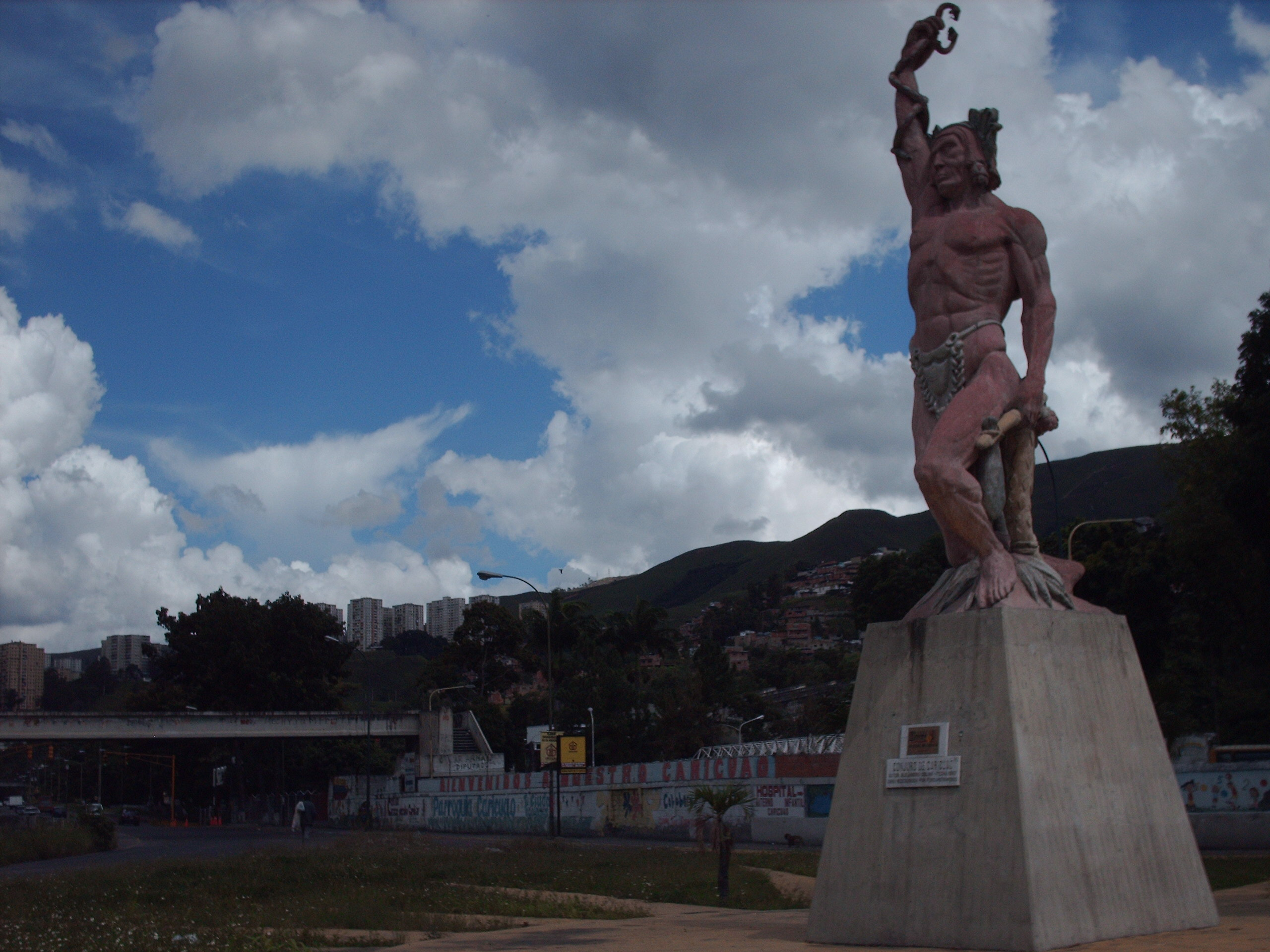 Esta estatua es un monumento al Cacique Caricuao. fue traída a la parroquia en los 70s y fue alterada (su color original era verde) en 1991.